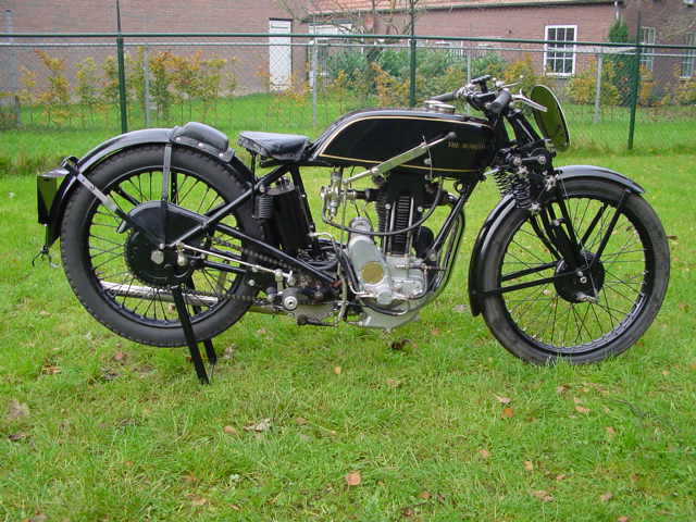 Toestemming van Yesterdays Antique Motorcycles